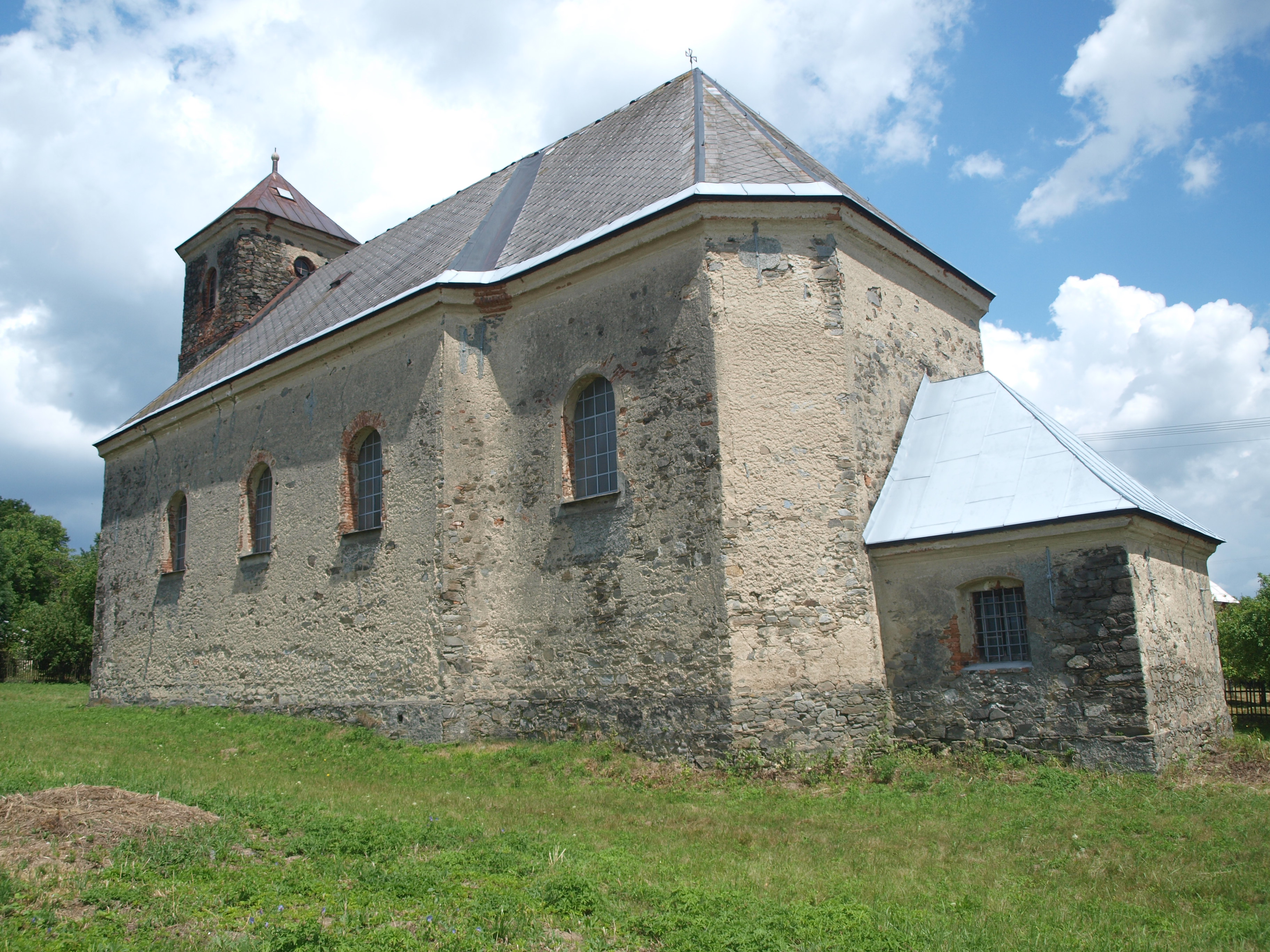 Kostel sv. Šimona a Judy v Těchově na Bruntálsku